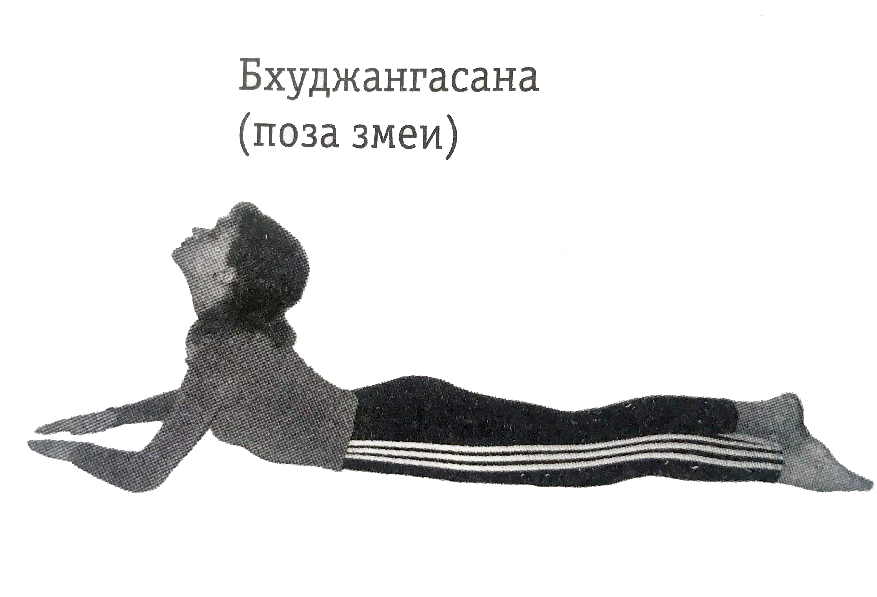 Асана йоги «бхуджангасана» в классическом виде